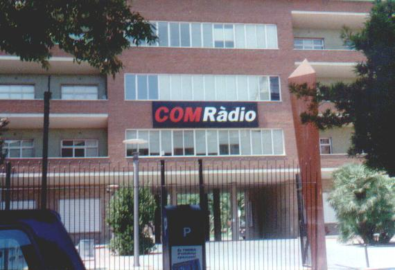 Estudios de COM Radio en Barcelona